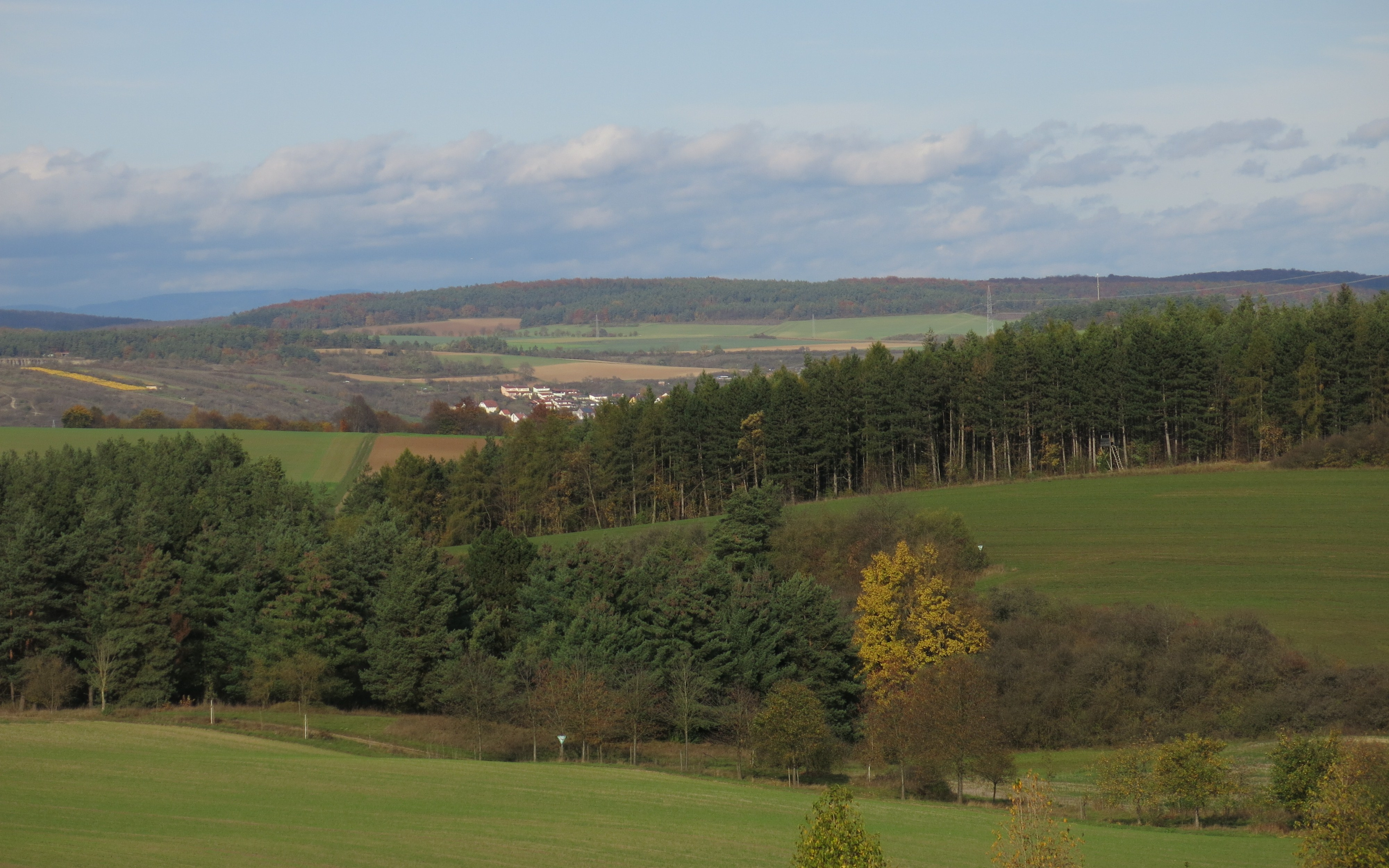 Geotop Flugsande östlich des Karlstadter Saupurzels - im Hintergrund der Ort Aschfeld und die Schwarzen Berge der Bayer. Rhön